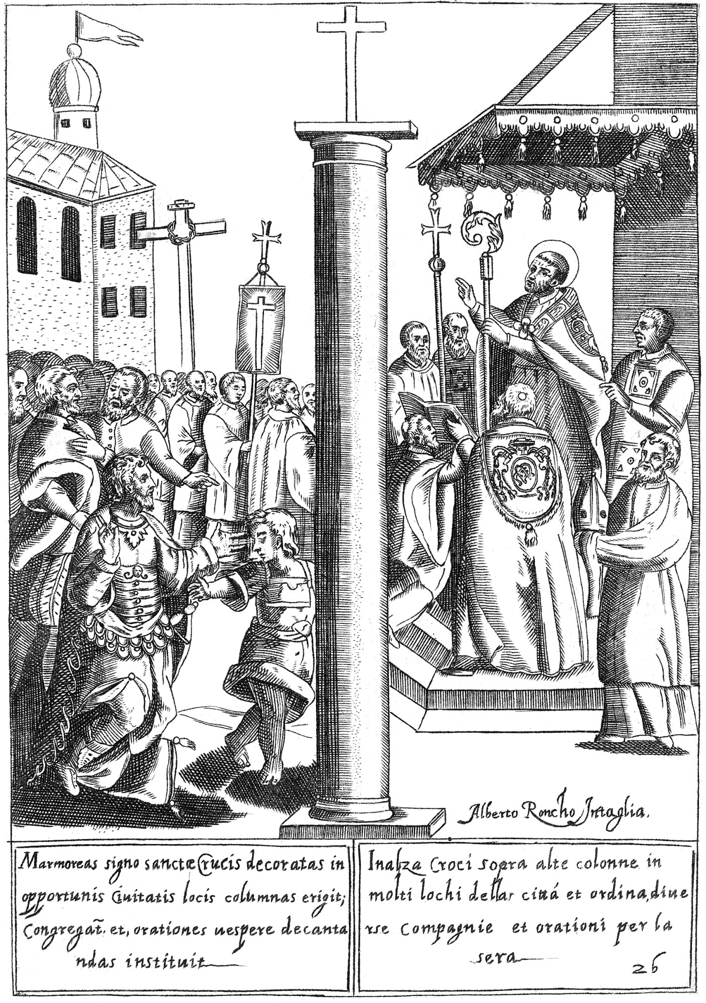 Incisione di Alberto Ronco